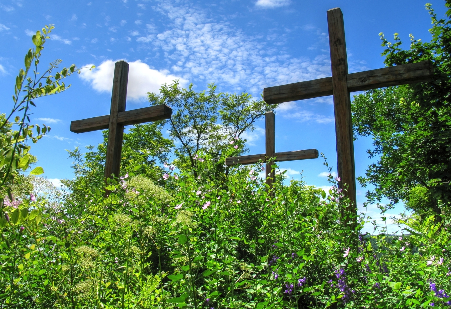 Рудь-Арионешть, монумент природы, находится в Дондушенский район, В 10 км от Отачь по течению р. Днестр, Отачское лесничество, урочище Арионешть-Стынка, кварталы 20-22; урочище Рудь-Гаван, кварталы 23-29 (код MD-DN-rp-017)